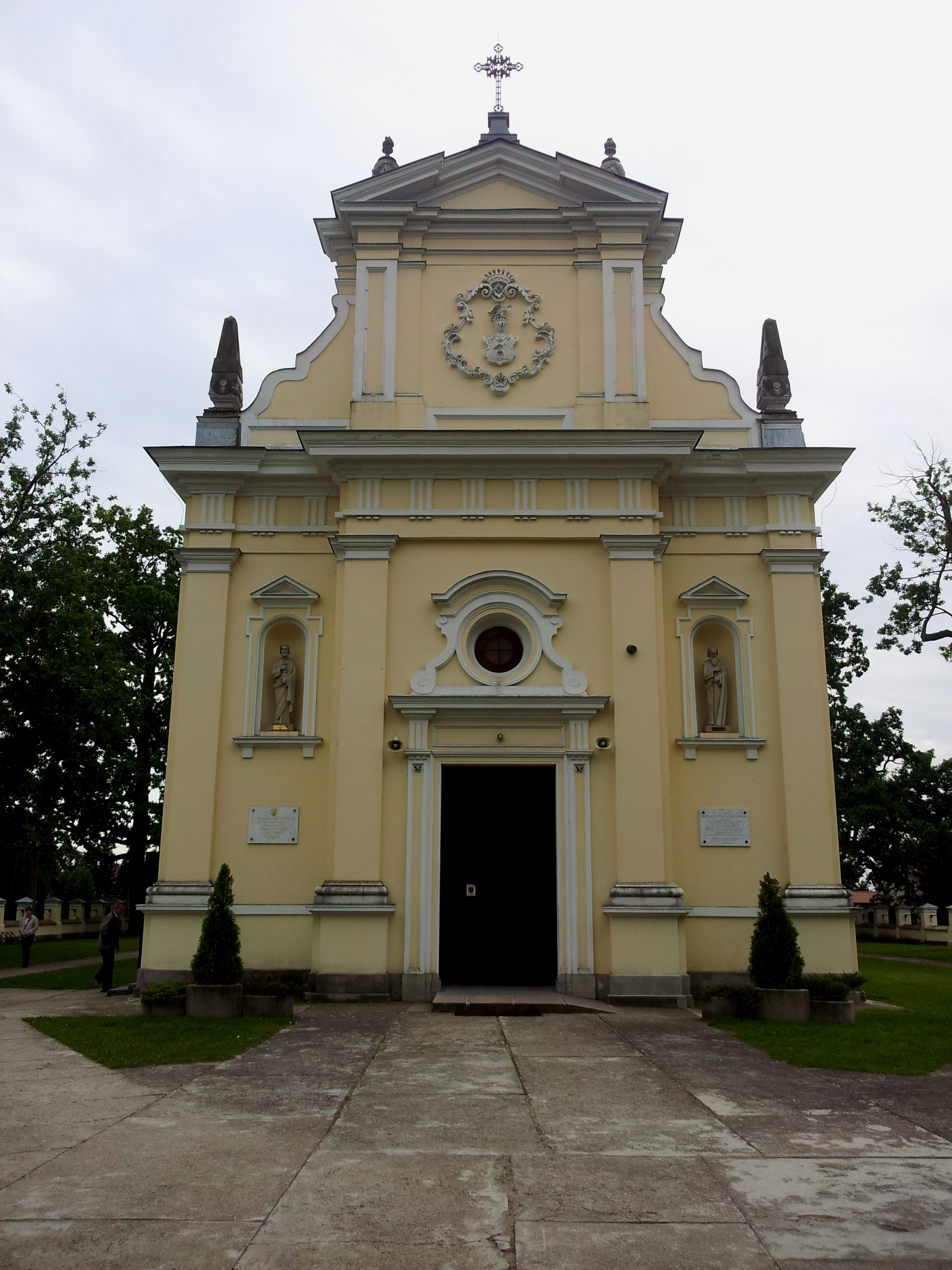 św. Antoniego , Wola Kiełpińska